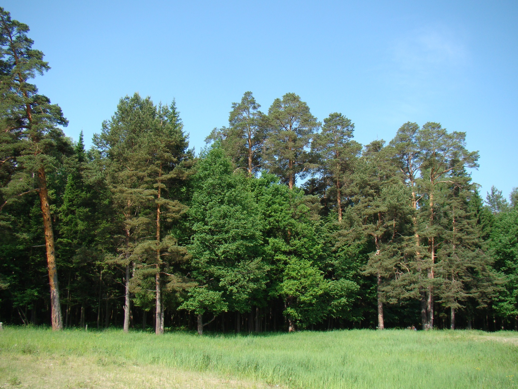 Южная опушка "Сосновой рощи" в черте города Йошкар-Ола. Возраст крупных сосен около 170 лет